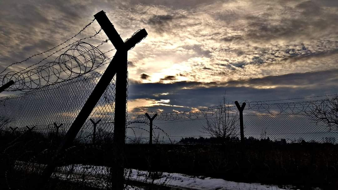 Makedonský pohraniční plot (hraniční kámen 59)